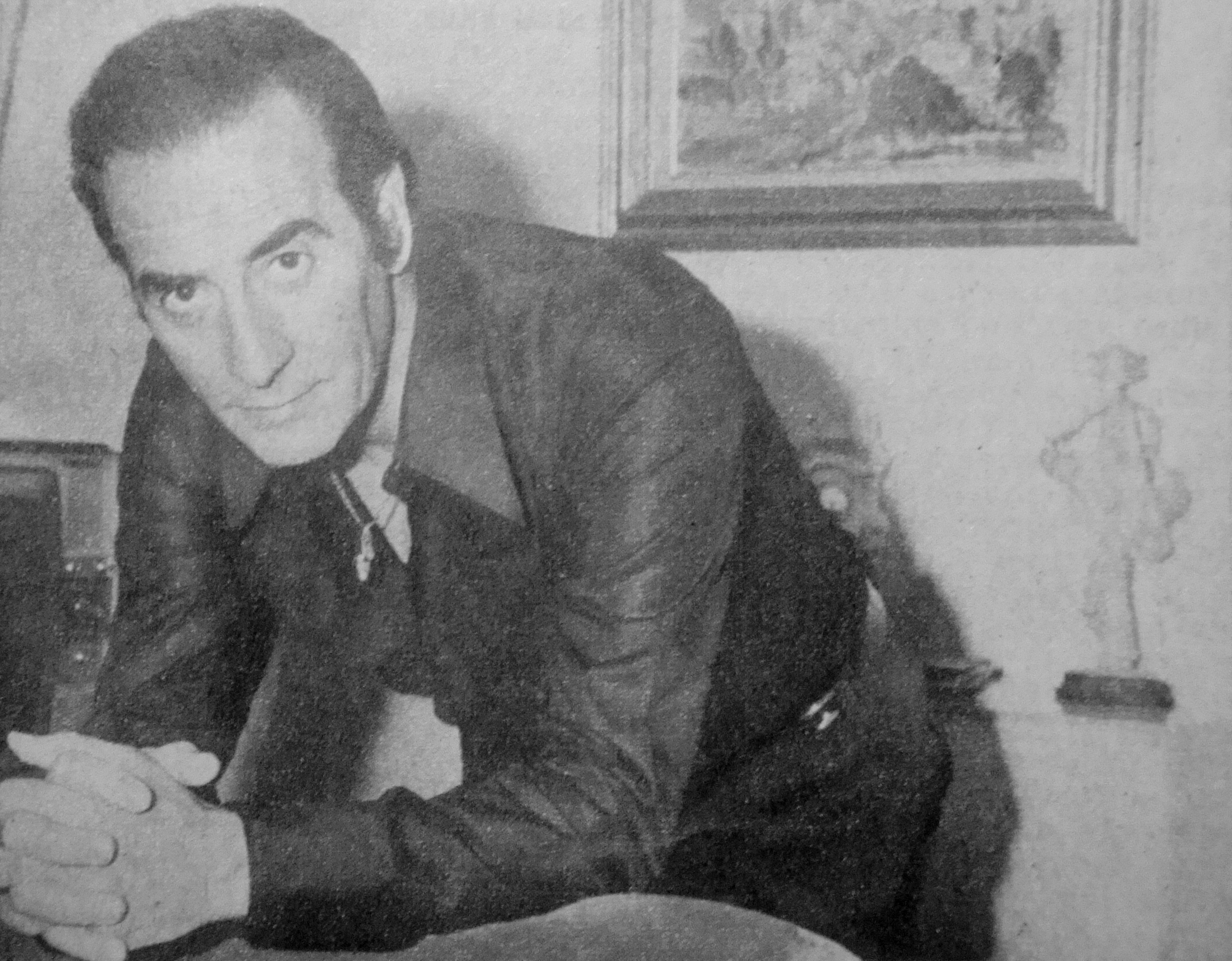 Jorge Salcedo en 1972.